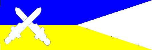 WZÓR GRAFICZNY PROPORCZYKA NA BERET ŻOŁNIERZY MORSKIEJ JEDNOSTKI RAKIETOWEJ